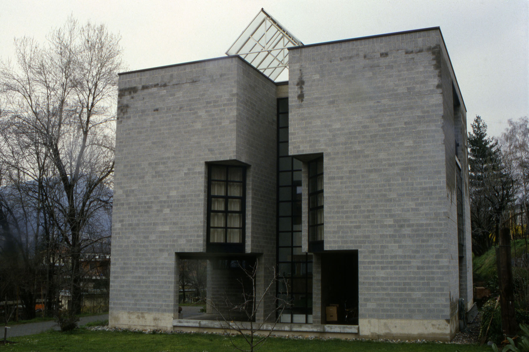 Pregassona, Casa Sampietro (arch. Mario Botta 1979-80)